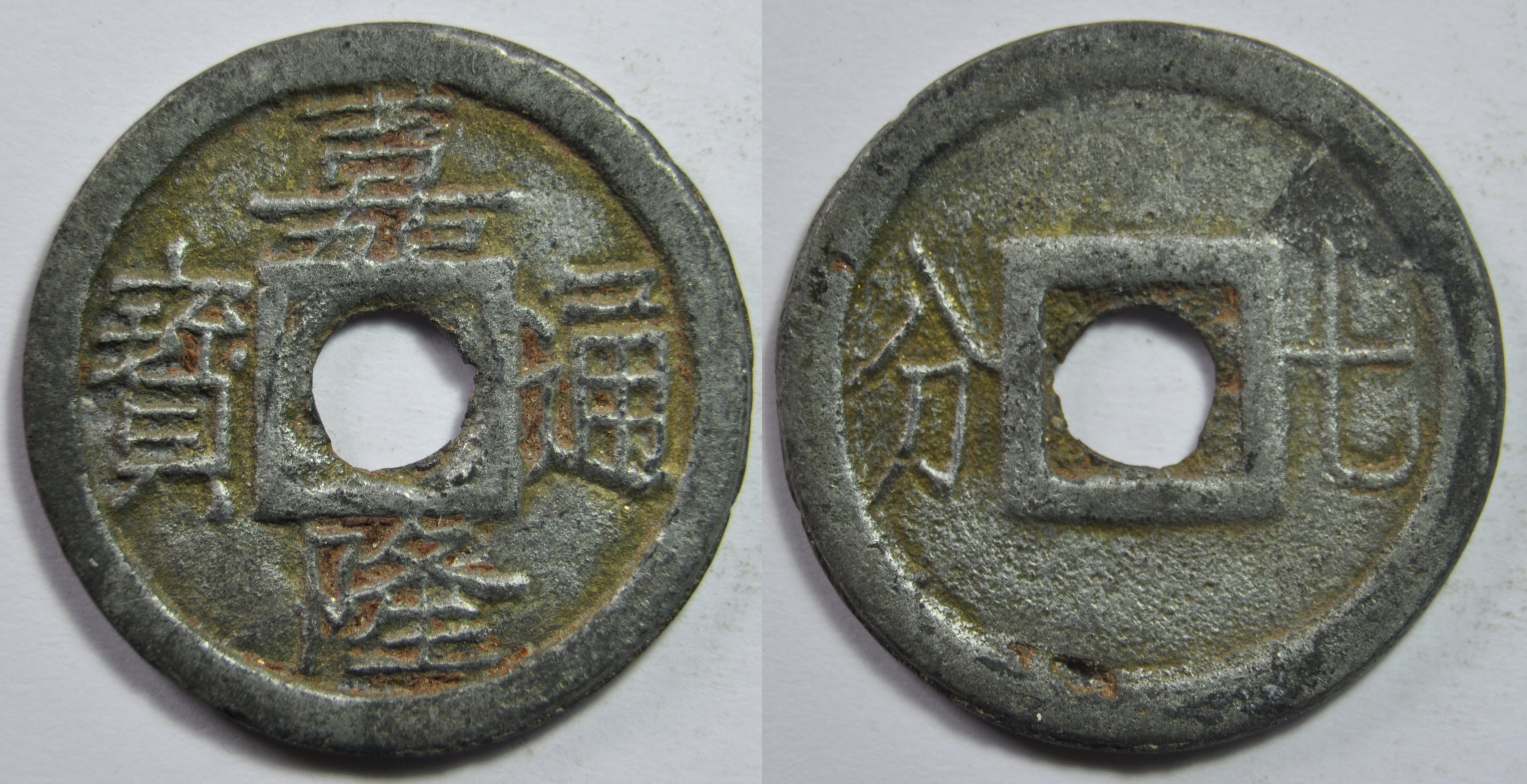 Une sapèque en zinc de l'empereur Nguyen Phuoc Anh (1802-1819), ère Gia Long (1802-1819). A/ Gia Long thong bao (Gia Long Thông Bảo, Monnaie courante de Gia Long) R/ That phan (Thất phân, 7 van) Dimension : 23,7 mm Poids : 2,6 g. Les monnaies de zinc ont été émises à partir de 1813. La parité entre les monnaies de laiton et de zinc sont de 100/130 en 1812, puis de 100/120 en 1814. La monnaie de zinc avait moins de valeur que celle de cuivre ou laiton. Elle était utilisée pour les achats quotidiens. Référence : n°1161 BNF, C63 Remarque : cet exemplaire est particulièrement bien conservé pour une monnaie en zinc. Le poids est conforme à ce qui est annoncé !